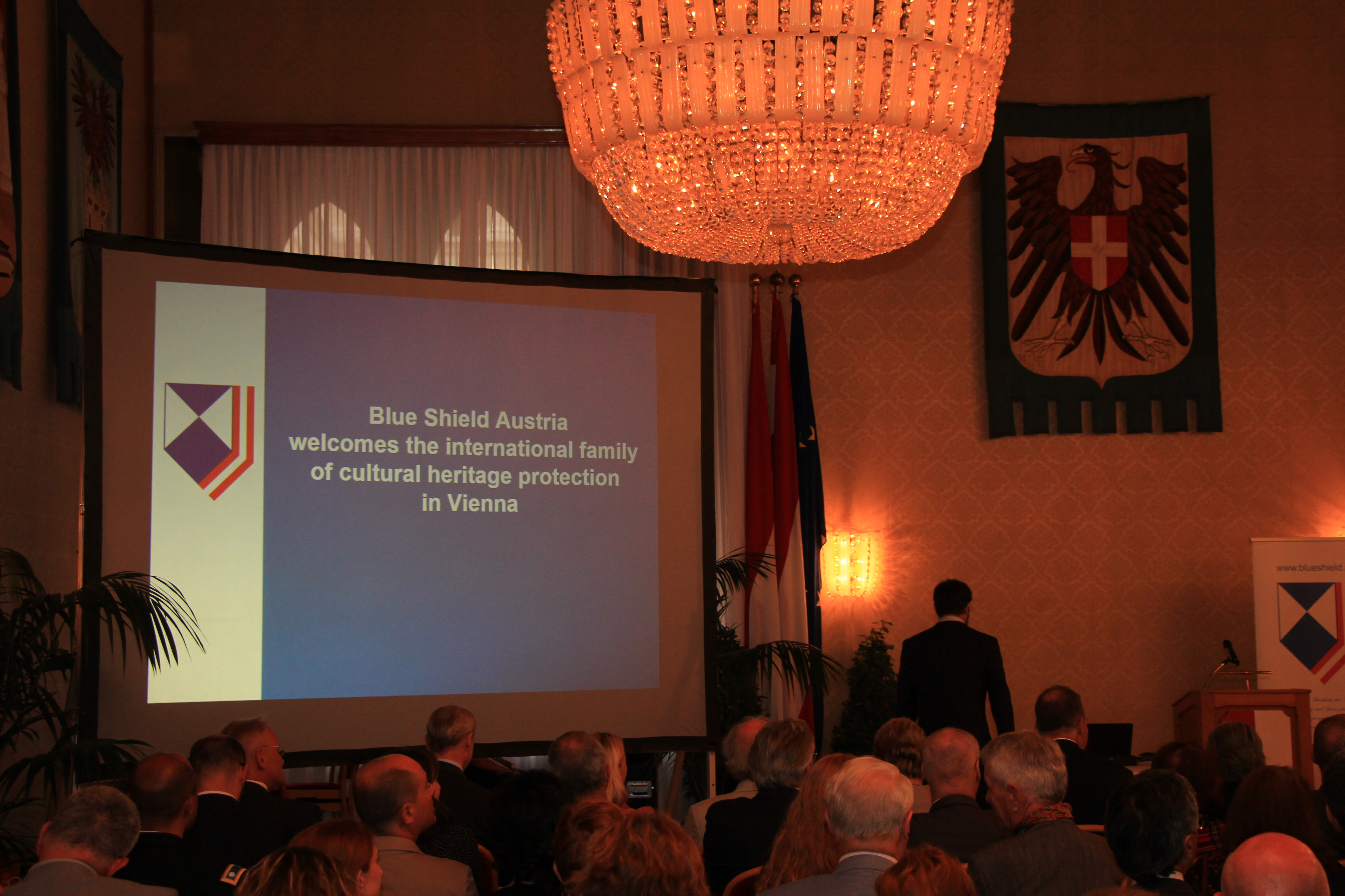 Generalversammlung der Organisation Blue Shield International im Wiener Rathaus